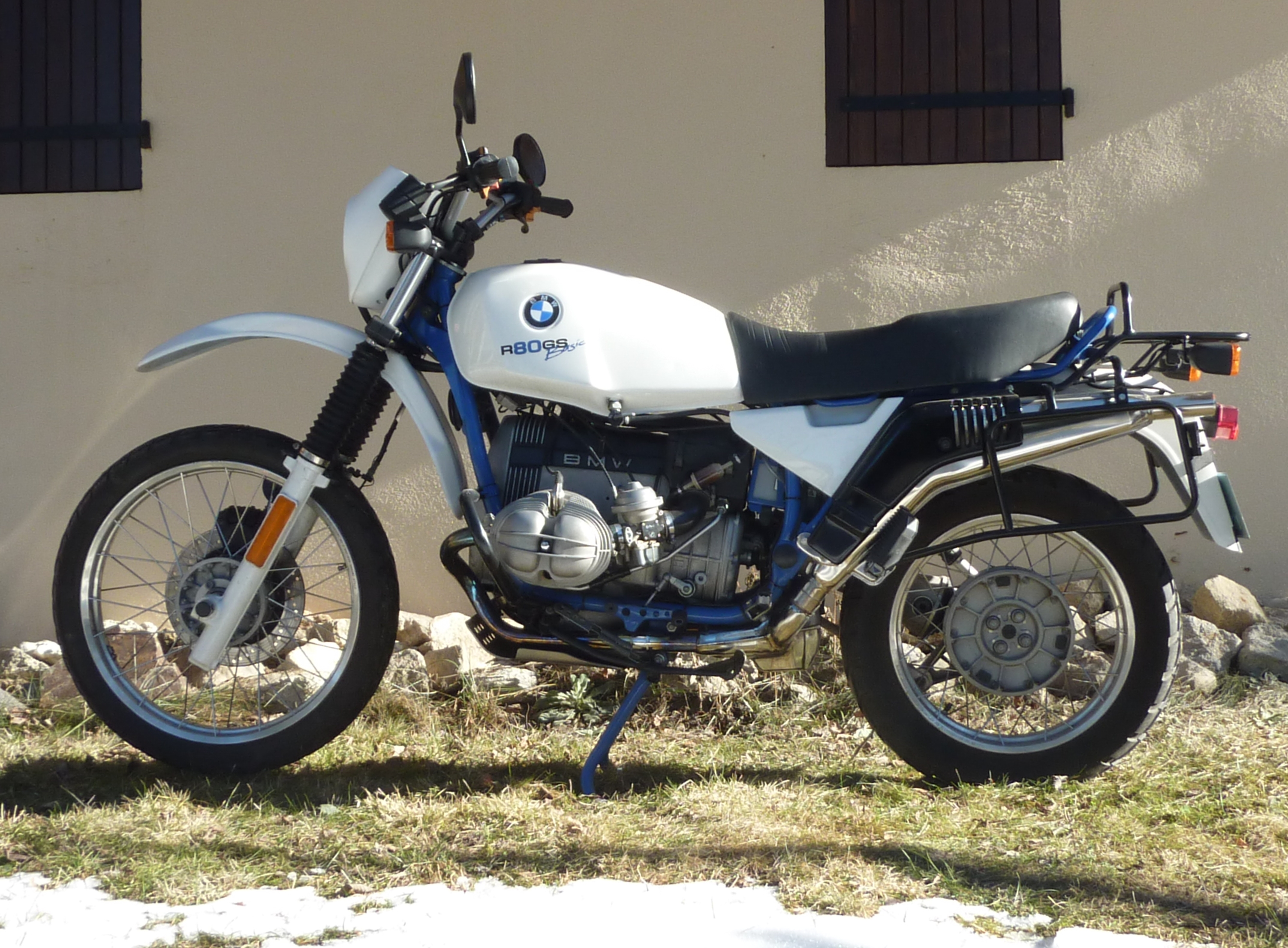 R80GS BASIC de Soto